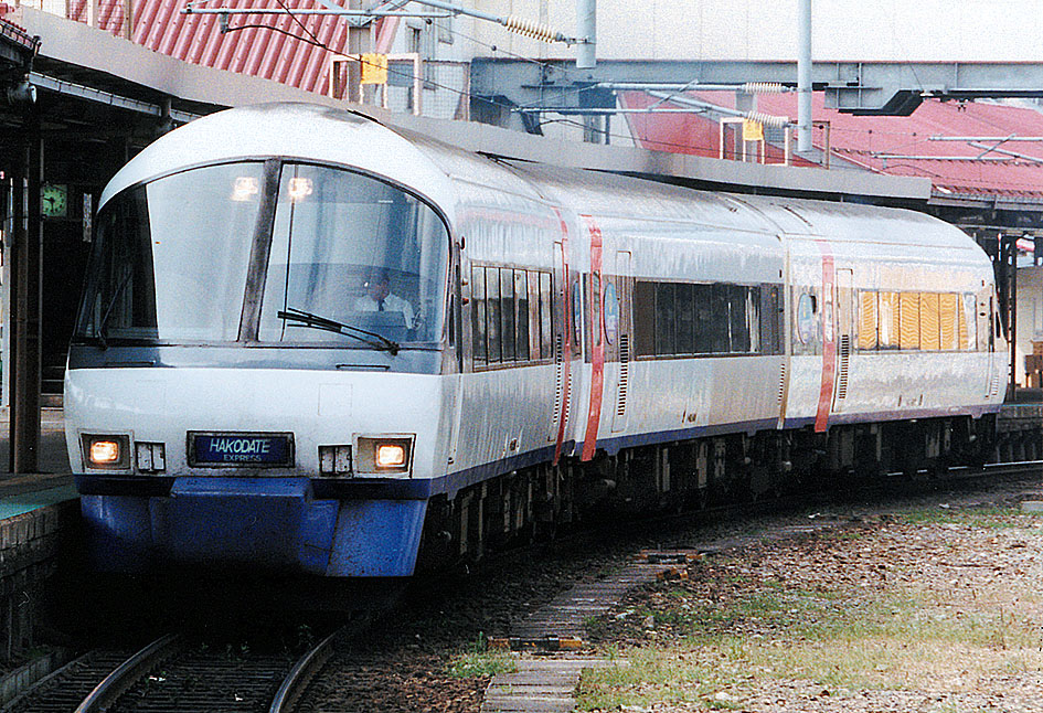 JR北海道 キハ183系ニセコエクスプレス「はこだてエクスプレス」